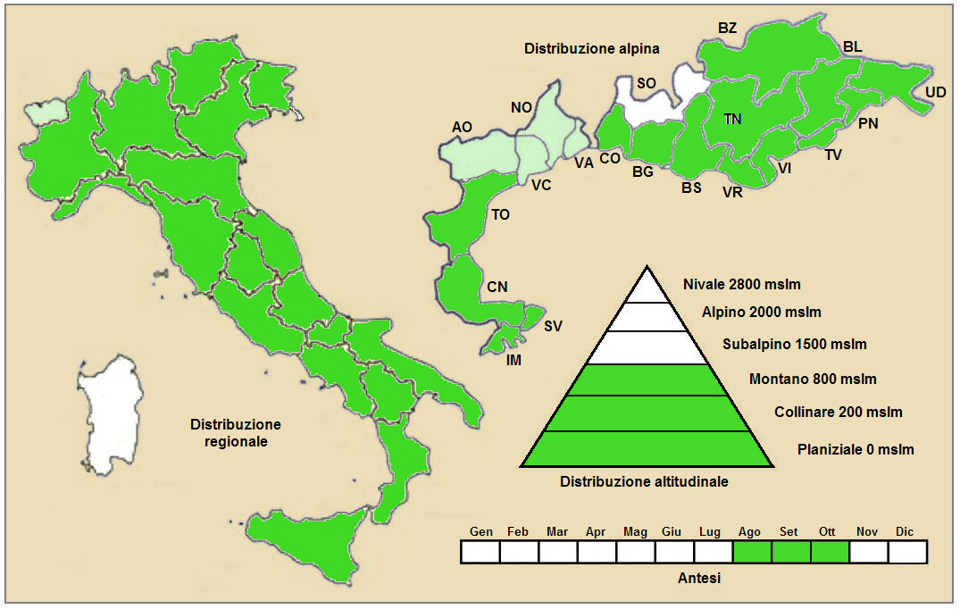 Artemisia alba - Distribuzione